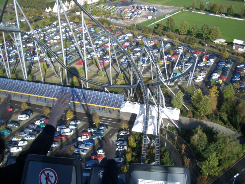 Fahrt mit dem Silver Star im Europa-Park Rust.